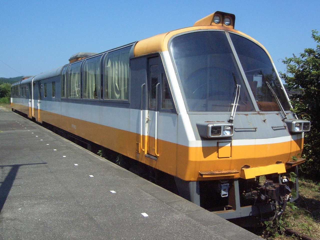 能登中島駅に静態保存されているのと鉄道NT800形気動車